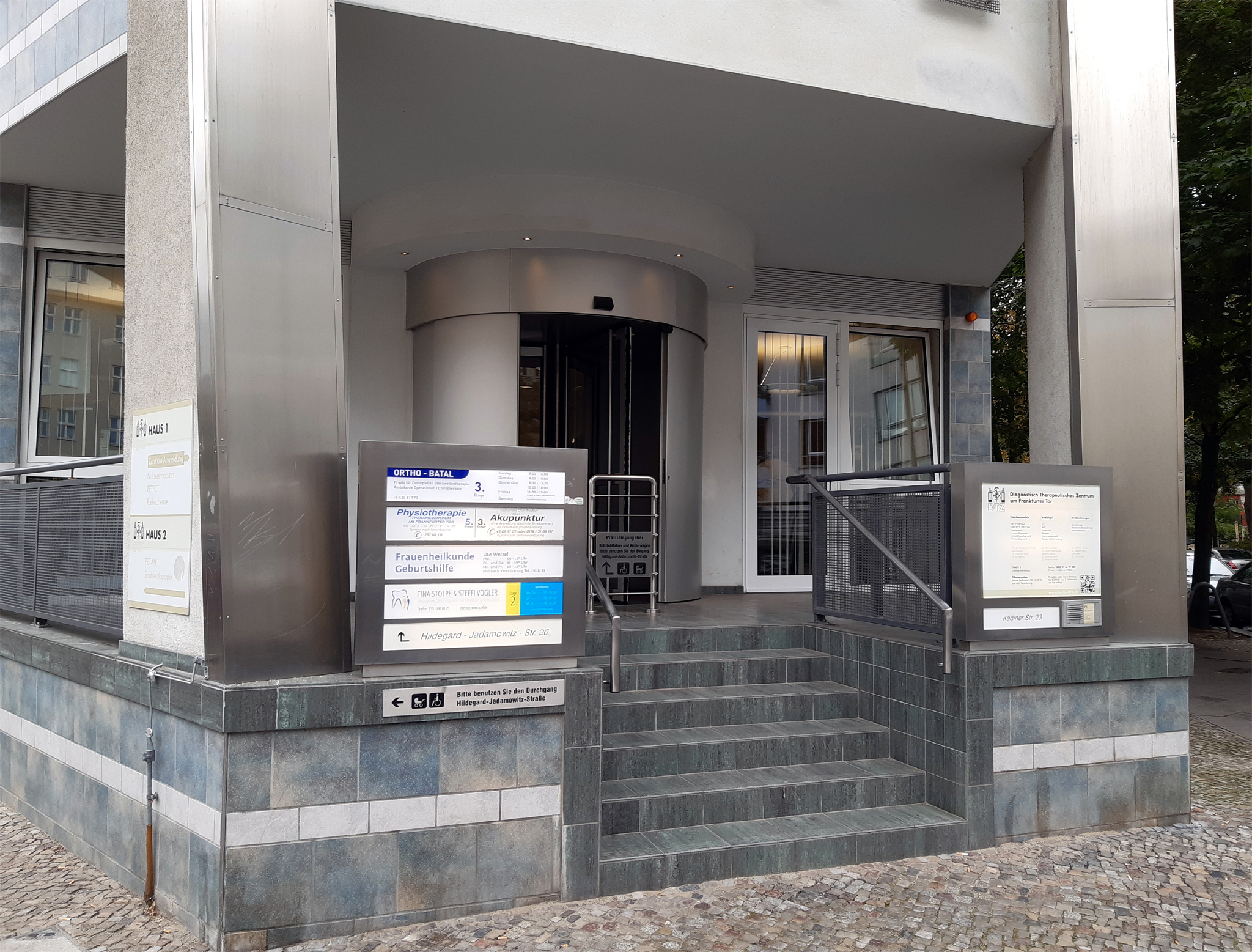 Eckeingang des repräsentativen Praxis-Wohngebäudes Kadiner Straße 23 / Hildegard-Jadamowitz-Straße 20 2019, Architekt: Peter Lissy. Eine sechsstufige türkis bunt marmorierte Treppe führt zu einem durch das auskragende Obergeschoss überdachten Podest und zum halbrunden edelstahlblechverkleideten Windfang, hinter dem eine Karusselltür in den Empfangsbereich des Diagnostisch-Therapeutischen Zentrums (DTZ Berlin) führt.